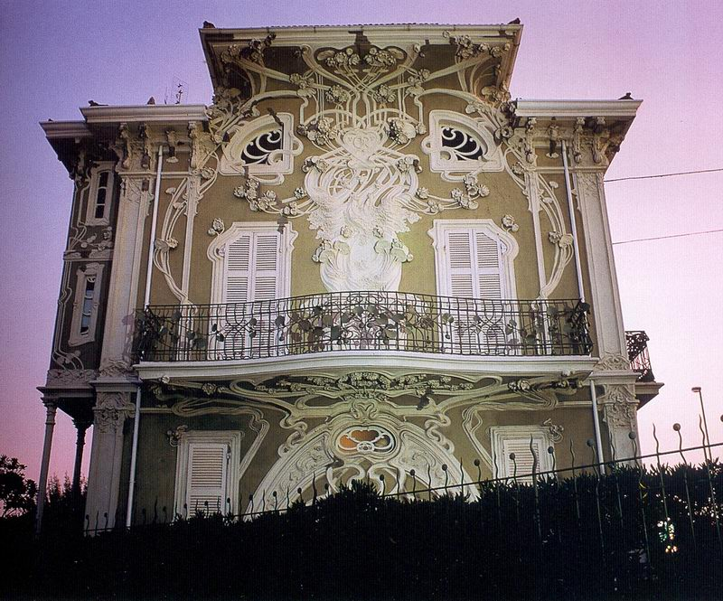 Villino Ruggeri